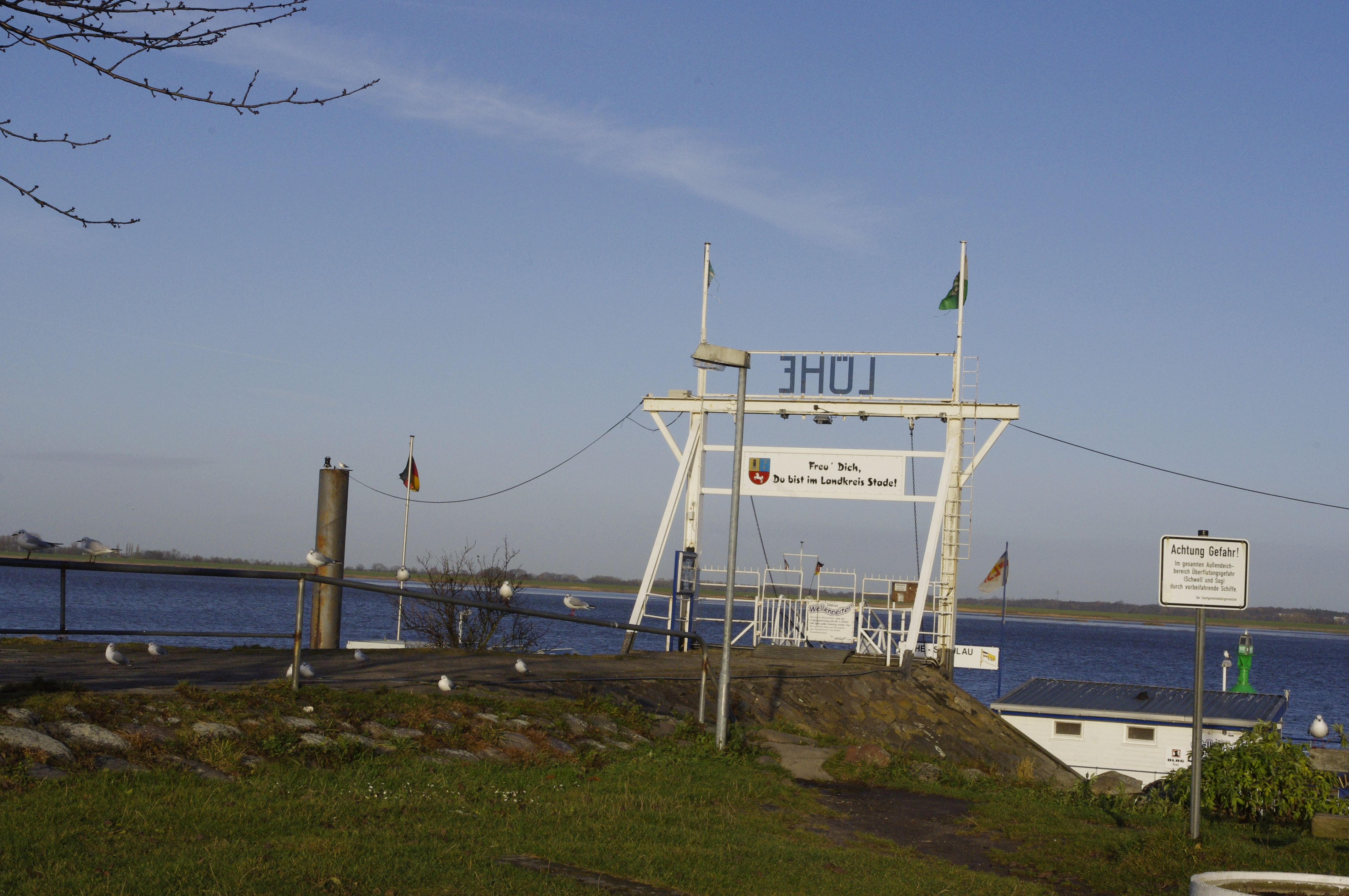 Lühe Anleger, Grünendeich